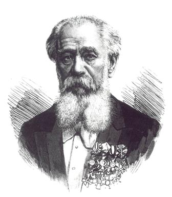 Bild von vor 1902